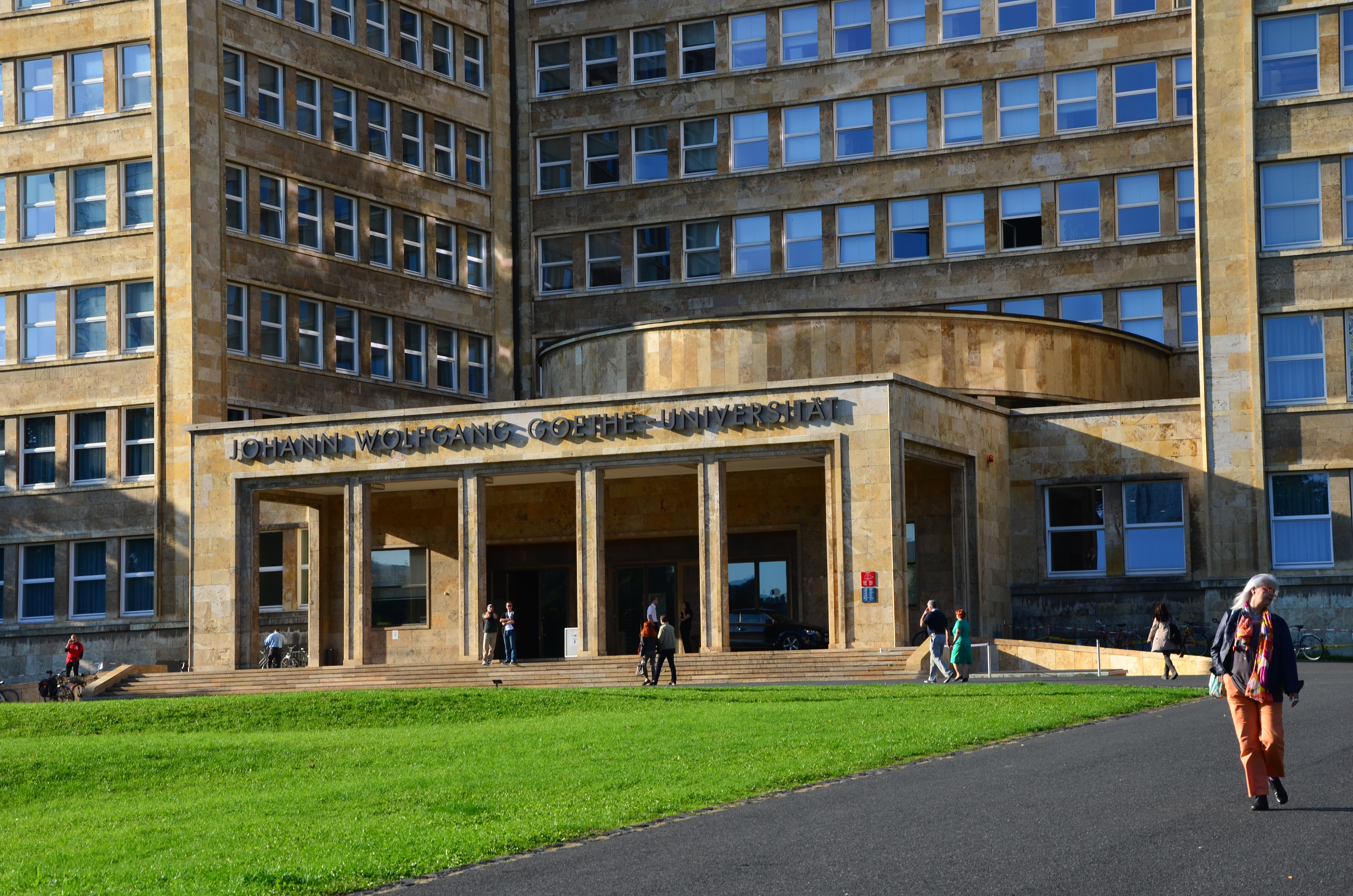 Eingang des I.G.-Farben-Haus auf dem Westend-Campus der Goethe - Universität Frankfurt am Main